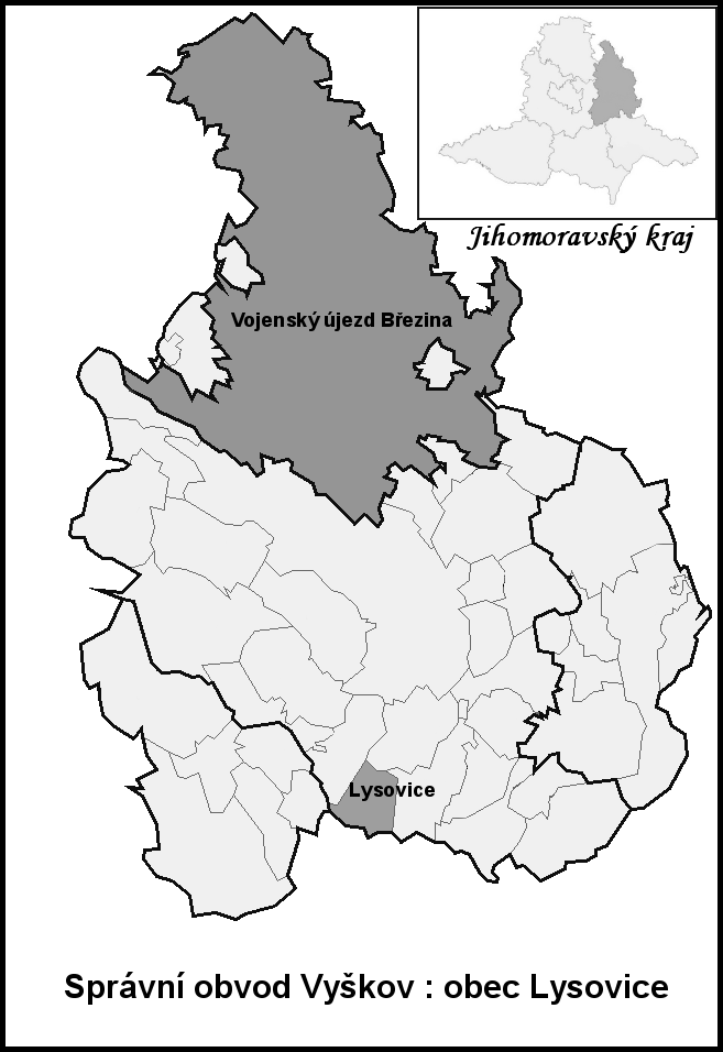 Hranice Lysovice (Vyškov- czech republic)